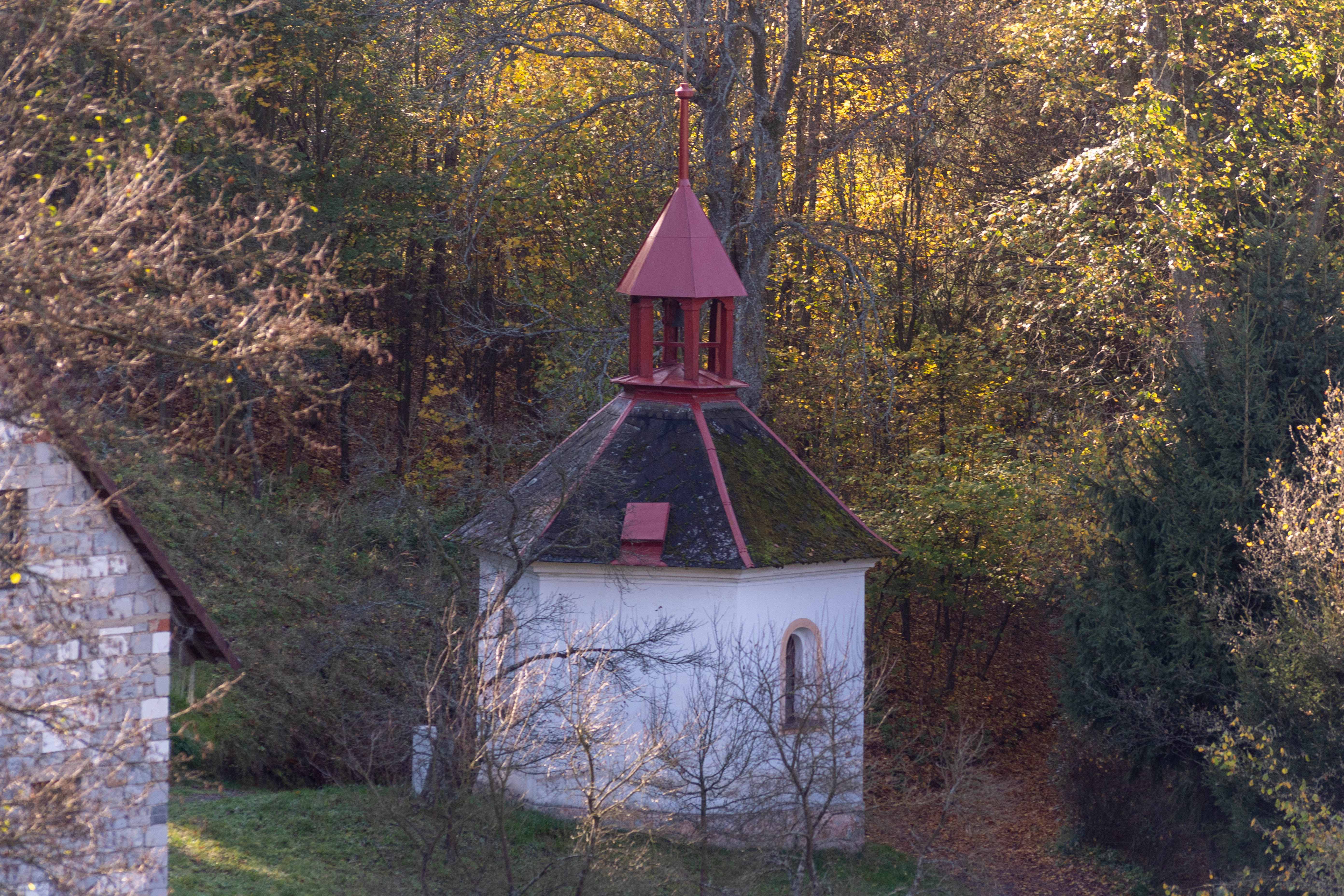 Kaplička v obci Údolí